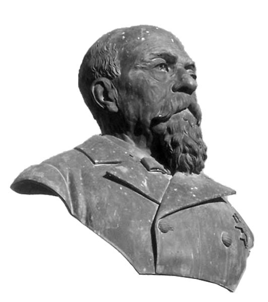 Busto de Eugenio Barrejón en la Plaza Calvo Sotelo de Alicante